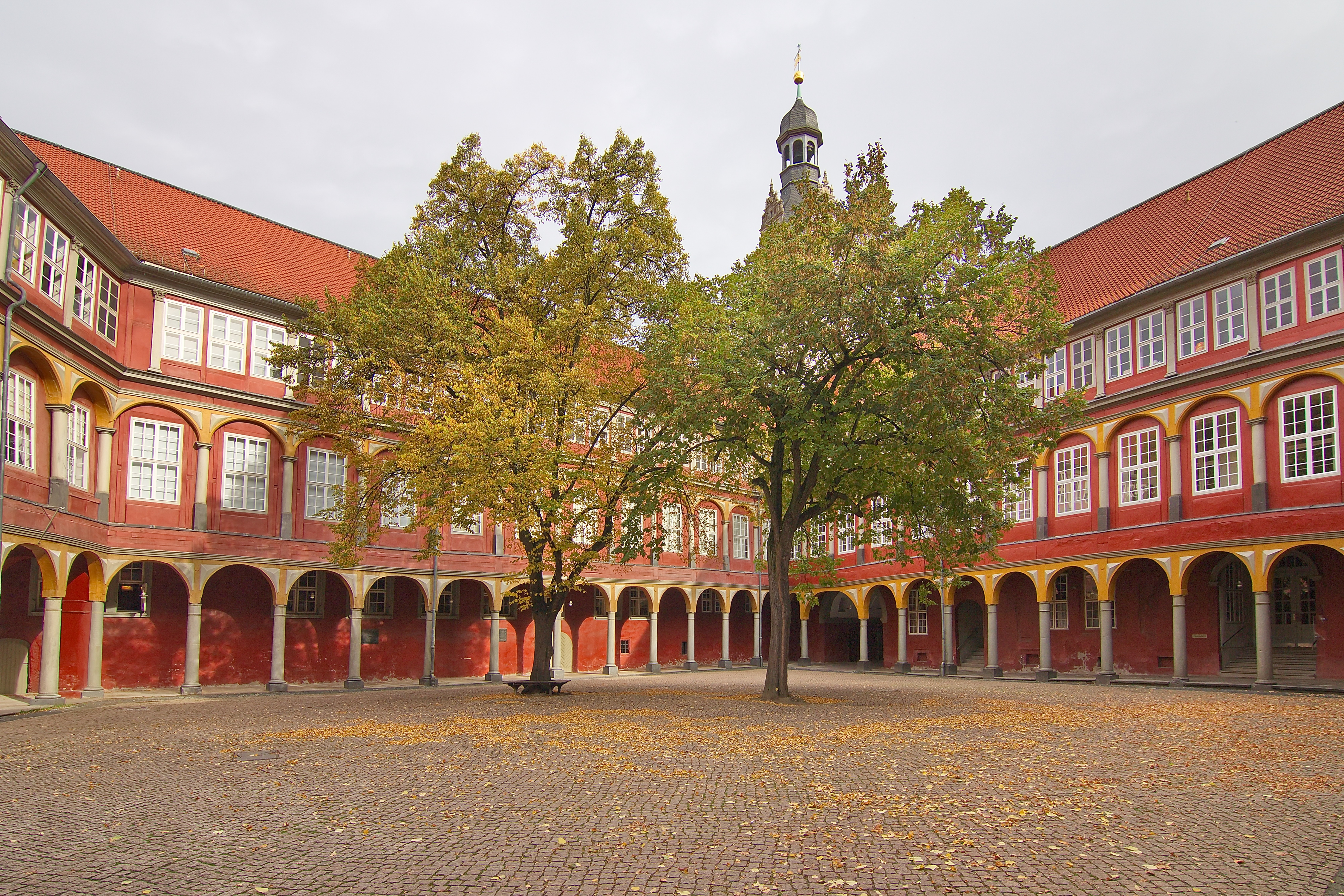 Schloss Wolfenbüttel in Wolfenbüttel, Niedersachsen, Deutschland